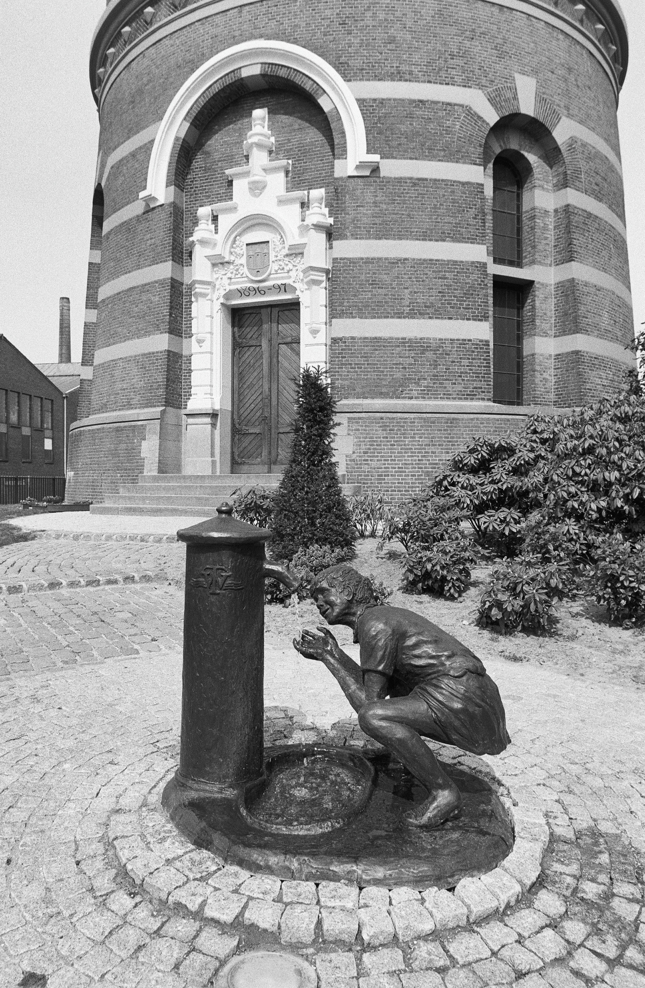 Watertoren/ Beeld: Watertoren, detail beeld en ingangspartij (opmerking: Gefotografeerd voor MIP Tilburg)